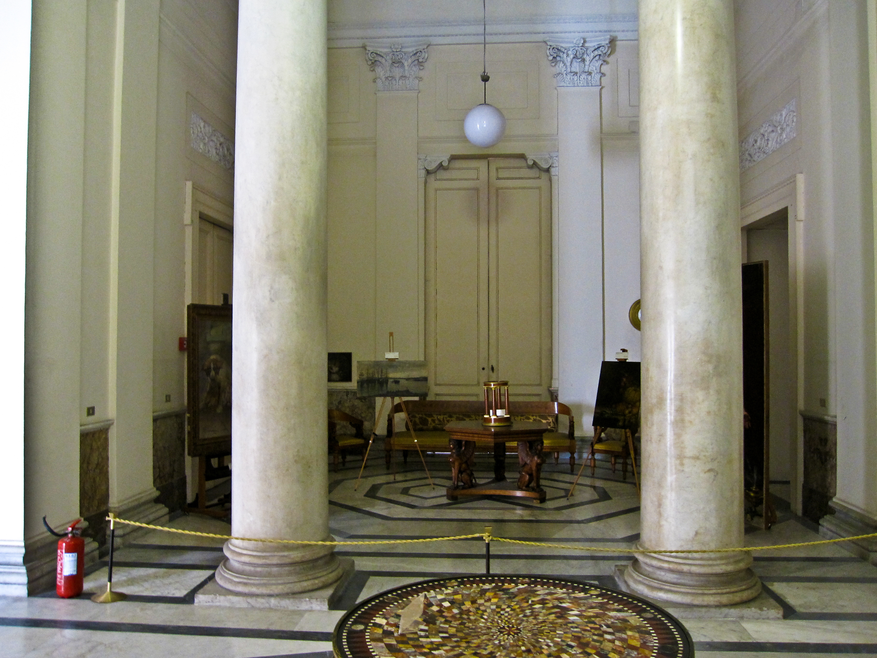 Appartamento storico